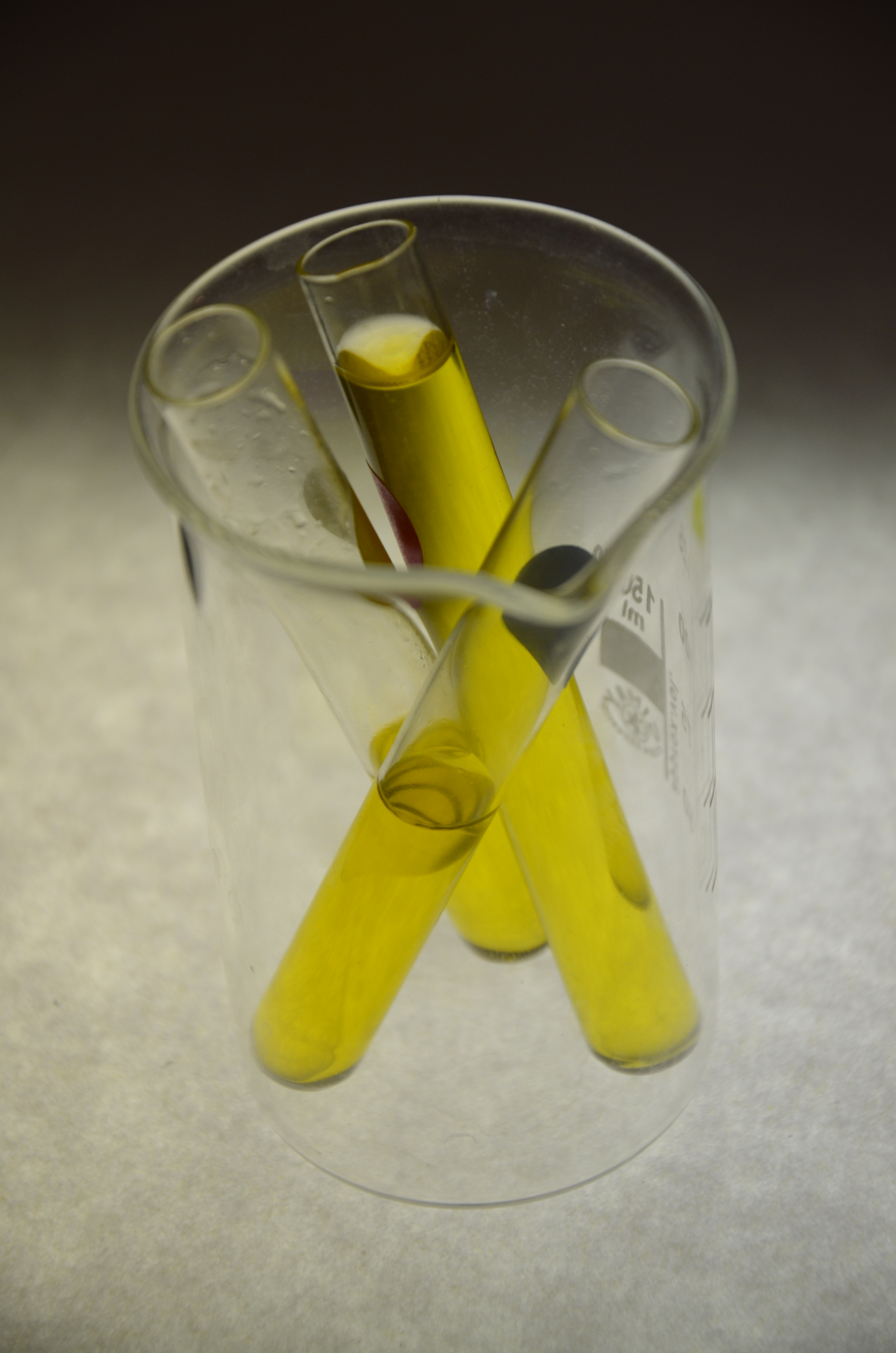 Éprouvettes d'analyse d'huile d'olive à l'UESS